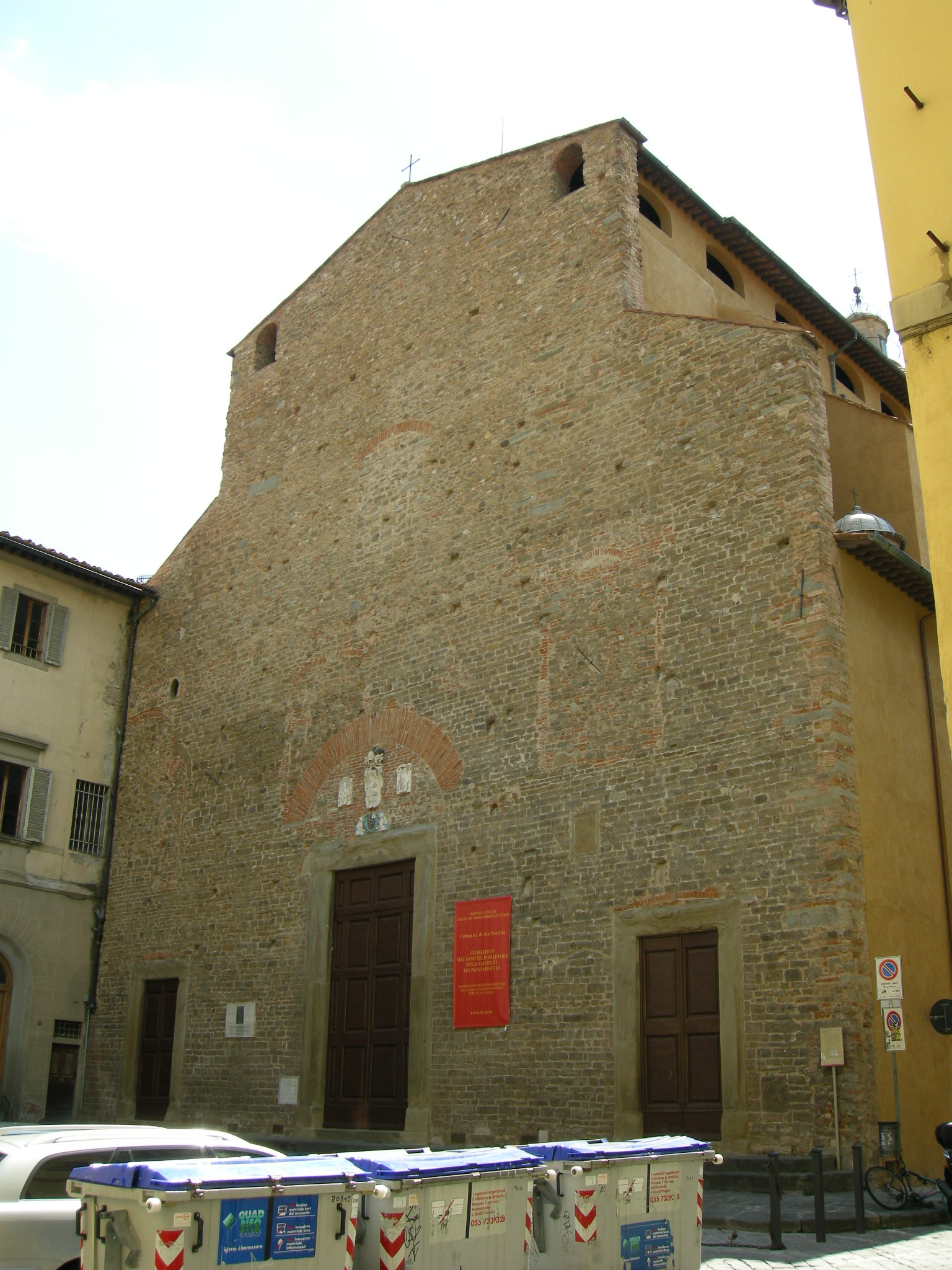 San paolino, facciata